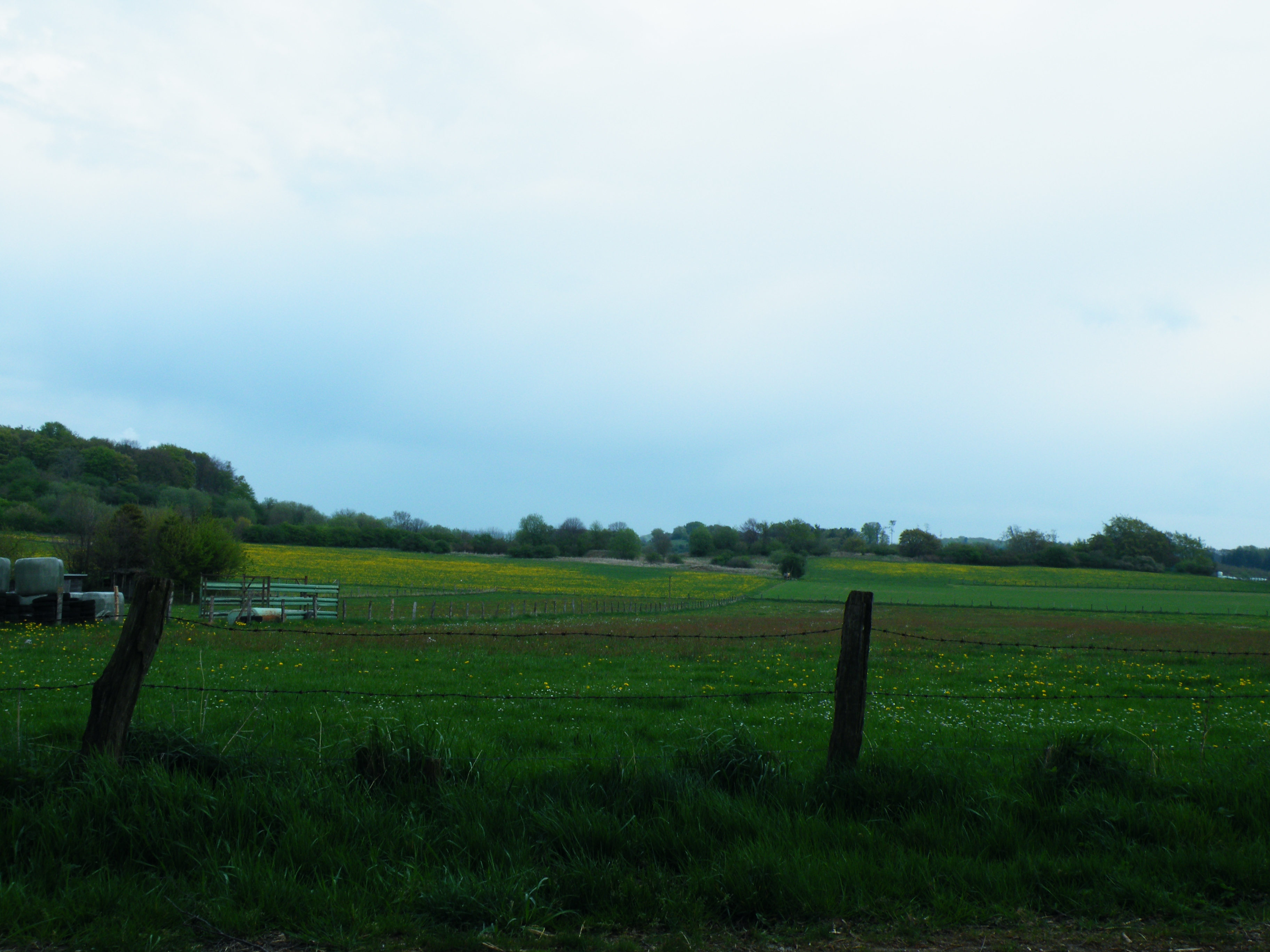 Landschaftsschutzgebiet Offenland südöstlich Brilon mit Naturschutzgebiet Frettholz im Hintergrund von Südosten.